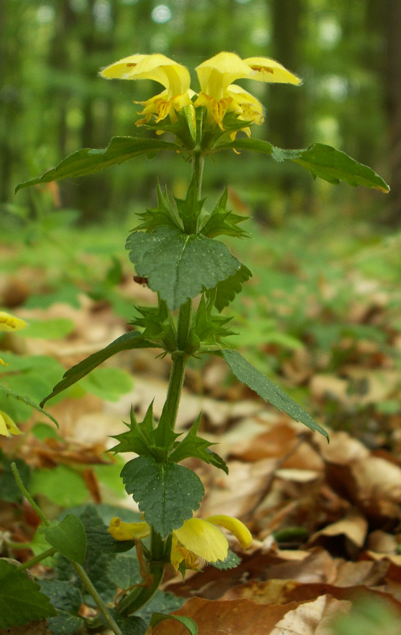 Galeobdolon luteum, Golczewo NW Poland